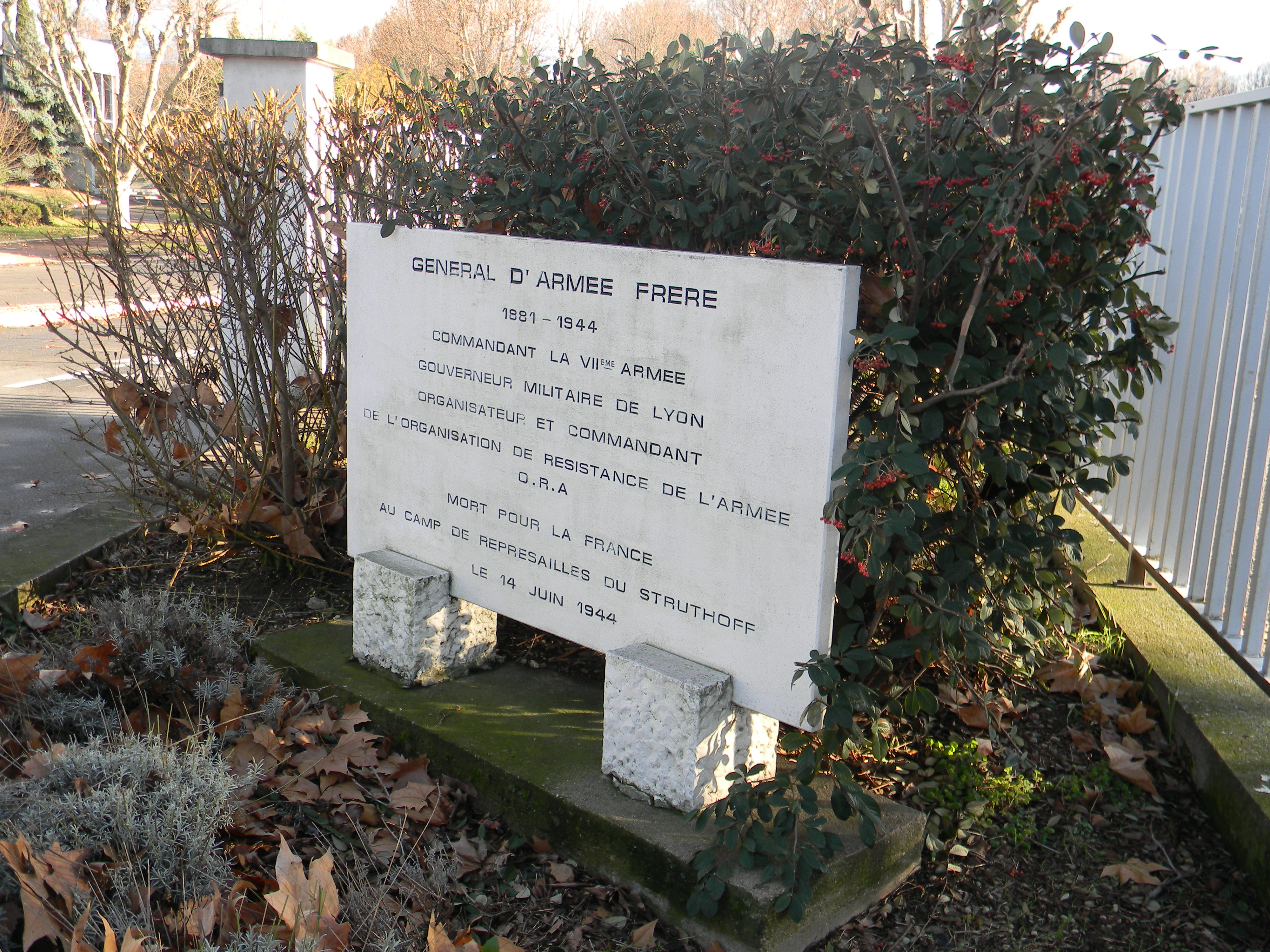 Plaque en mémoire d'Aubert Frère au Quartier Général-Frère (ex fort de la Vitriolerie) à Lyon. Inscription : Général d'armée Frère 1881-1944 Commandant de la VIIème Armée Gouverneur militaire de Lyon Organisateur et commandant de l'organisation de résistance de l'armée O.R.A Mort pour la France au camp de représailles du Struthoff le 14 juin 1944.